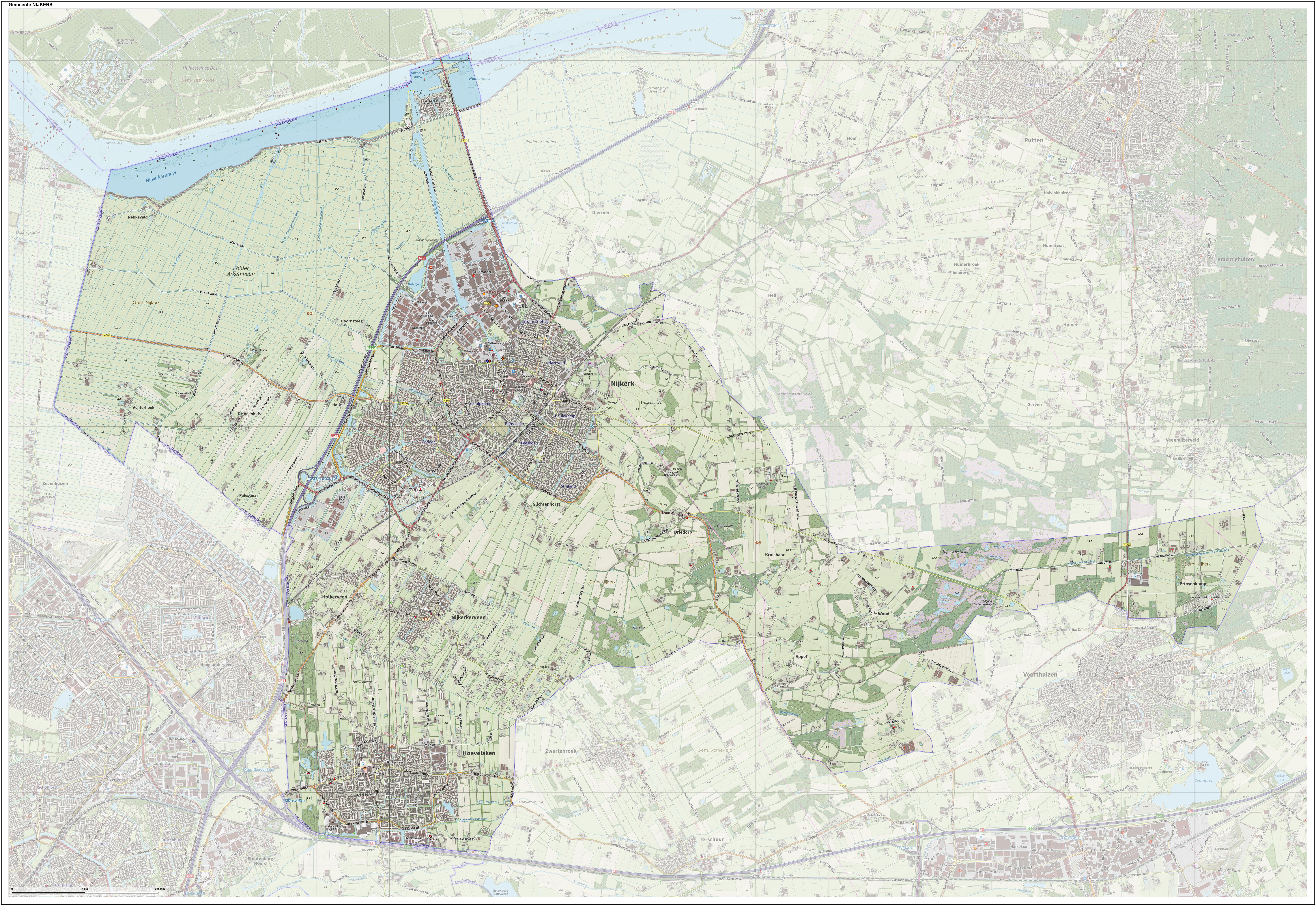 Topografische gemeentekaart. Resolutie: 400 pixels/km. Kaartbeeld samengesteld uit de open geodata van de Top10NL en Top25namen (Kadaster), Creative Commons-BY licentie. Gebouwvlakken uit open geodata BAG extract. Wegen uit de OpenStreetMap, OpenStreetMap community. Reliëfschaduw uit de Actuele Hoogtekaart AHN2. Samenstelling en kleurenschema: Jan-Willem van Aalst, met QGIS. Zie ook de Legenda.